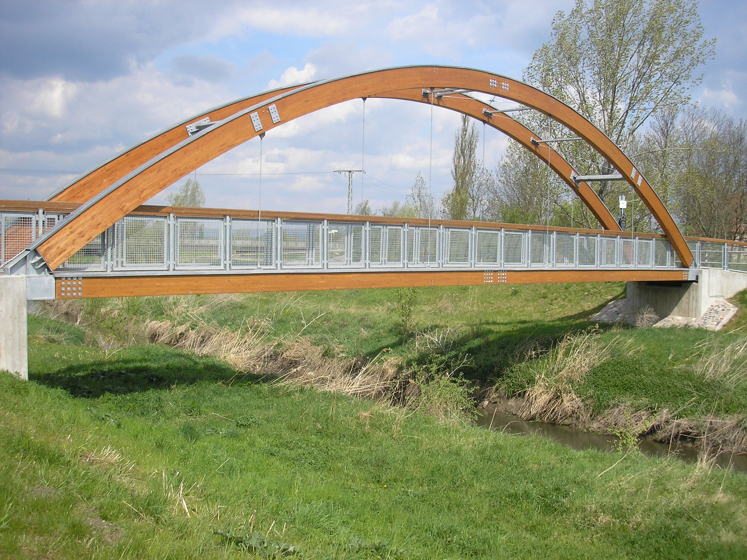 Die Brücke des Unstrut-Radwegs über die Lossa in Leubingen (Thüringen).